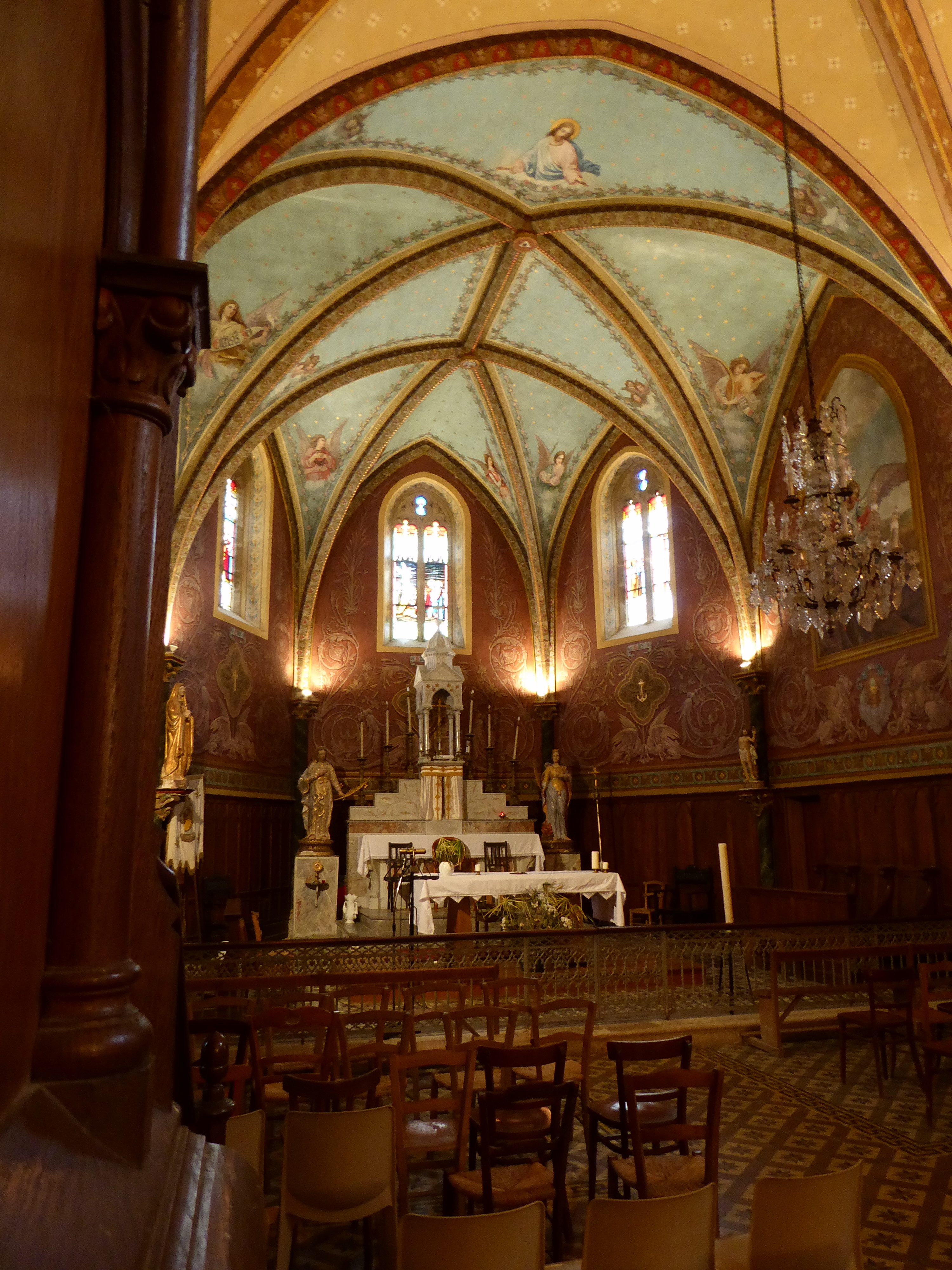 Église Sainte-Blandine de Castet-Arrouy